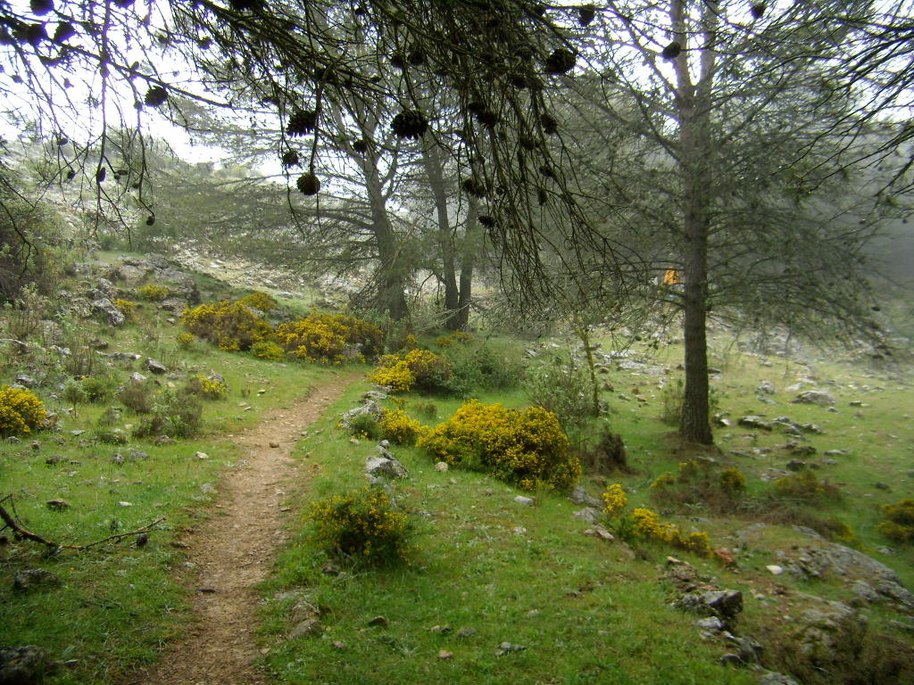 Pinar en Alfarnate, España.